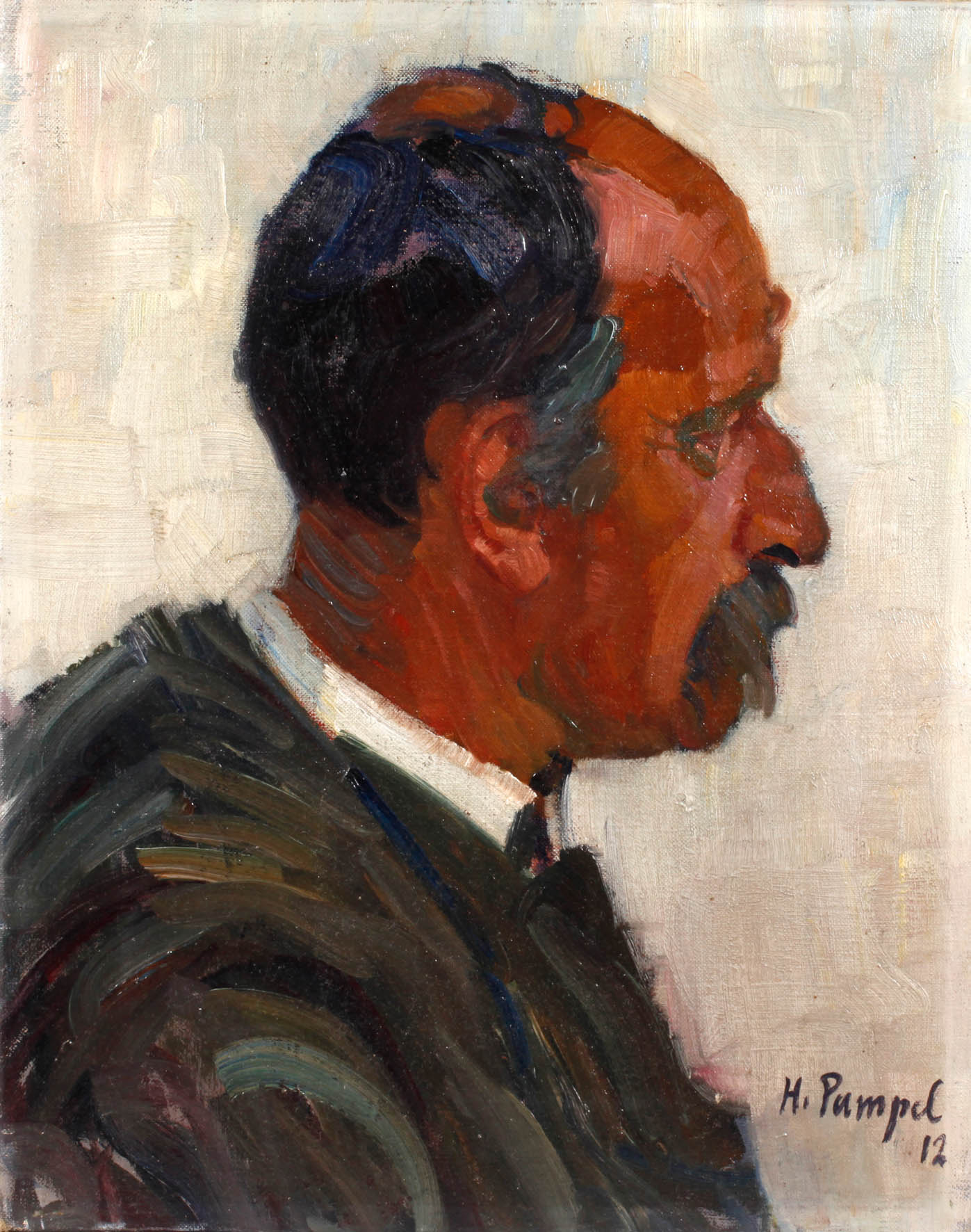 Herrenporträt